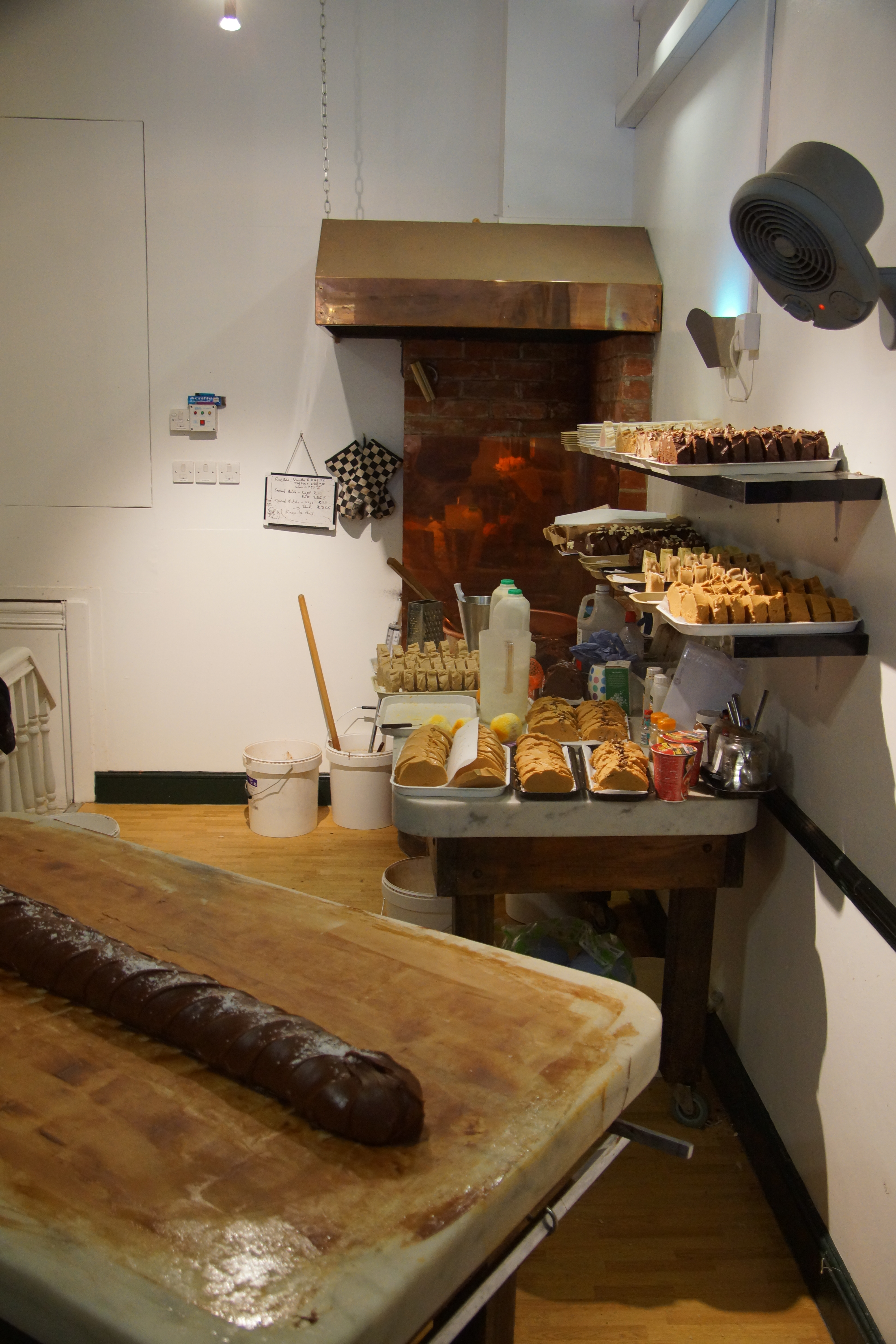 Fudgeherstellung in Fudgeshop in Oxford